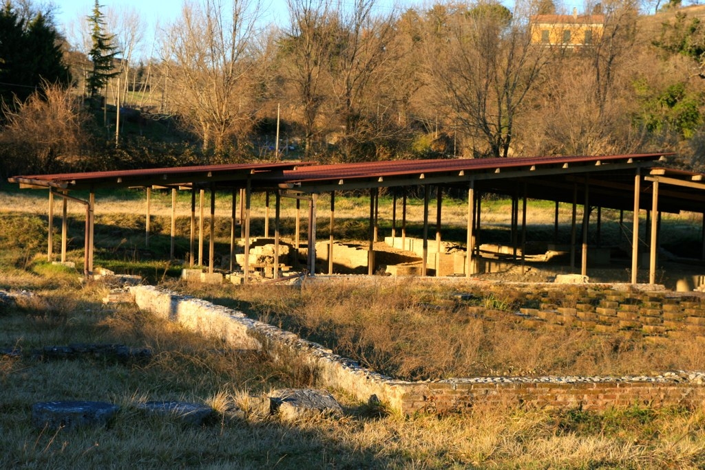 Edificio termale, Septempeda, San Severino Marche, Macerata, Italia